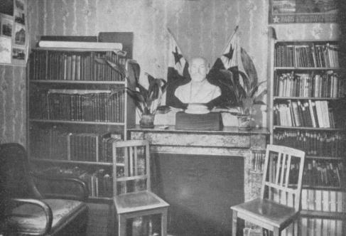 Biblioteko de UEA, 1923, laŭ UEA-broŝuro